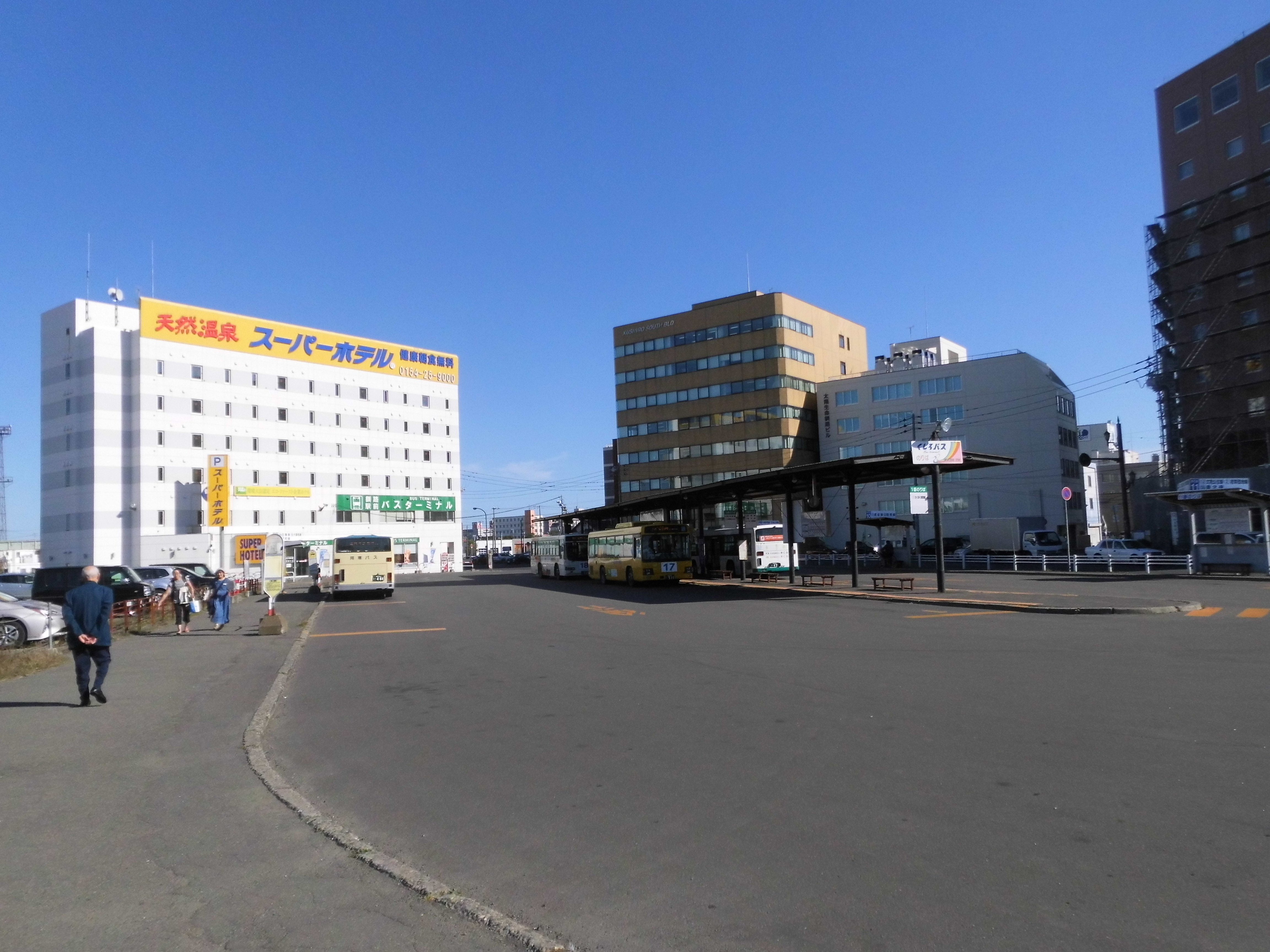 くしろバス、阿寒バスの路線バスや都市間バスの発着場。